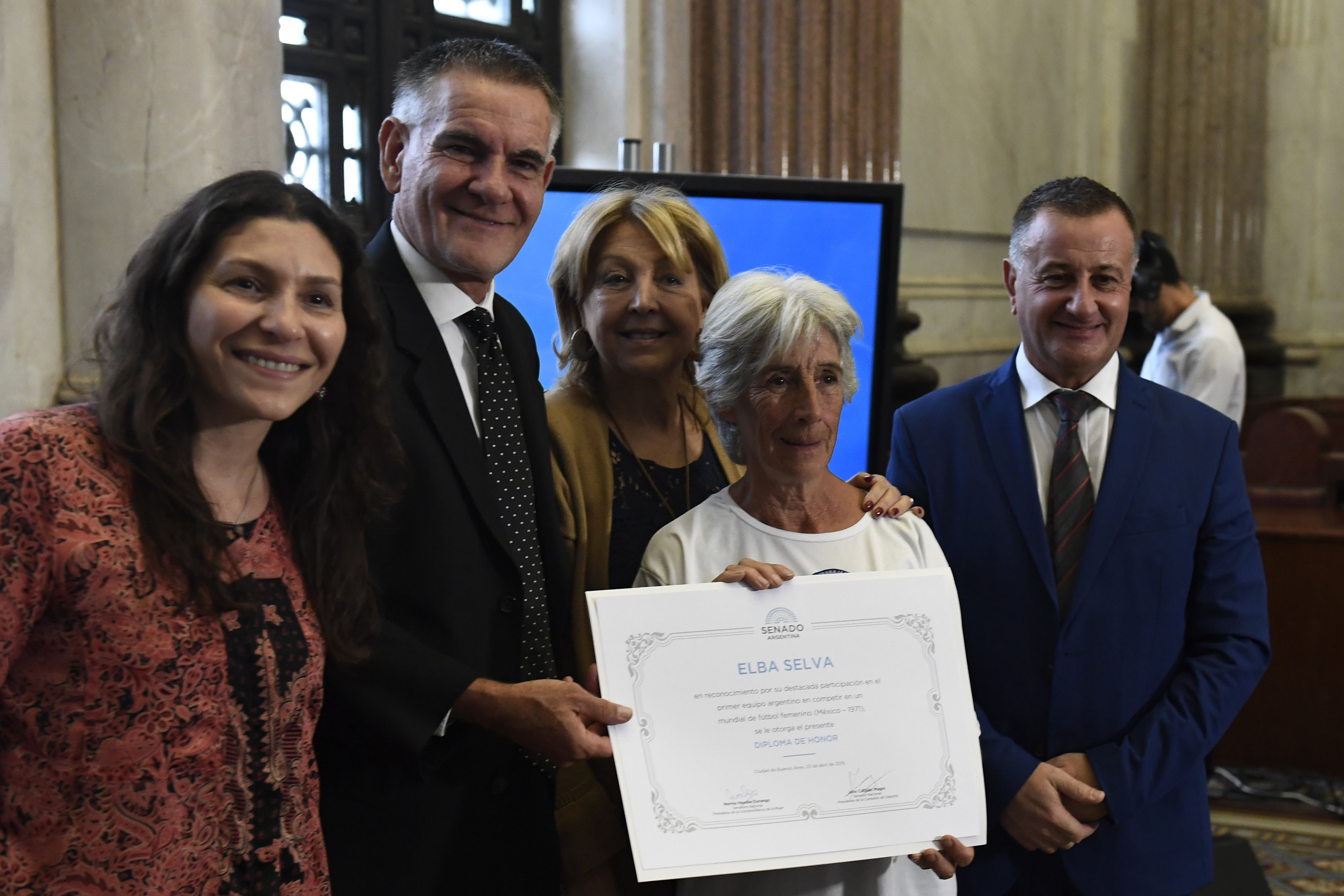 Elba Selva, futbolista argentina que participó de la Copa Mundial Femenina de 1971, recibiendo un Diploma de Honor en el Senado de la Nación Argentina.